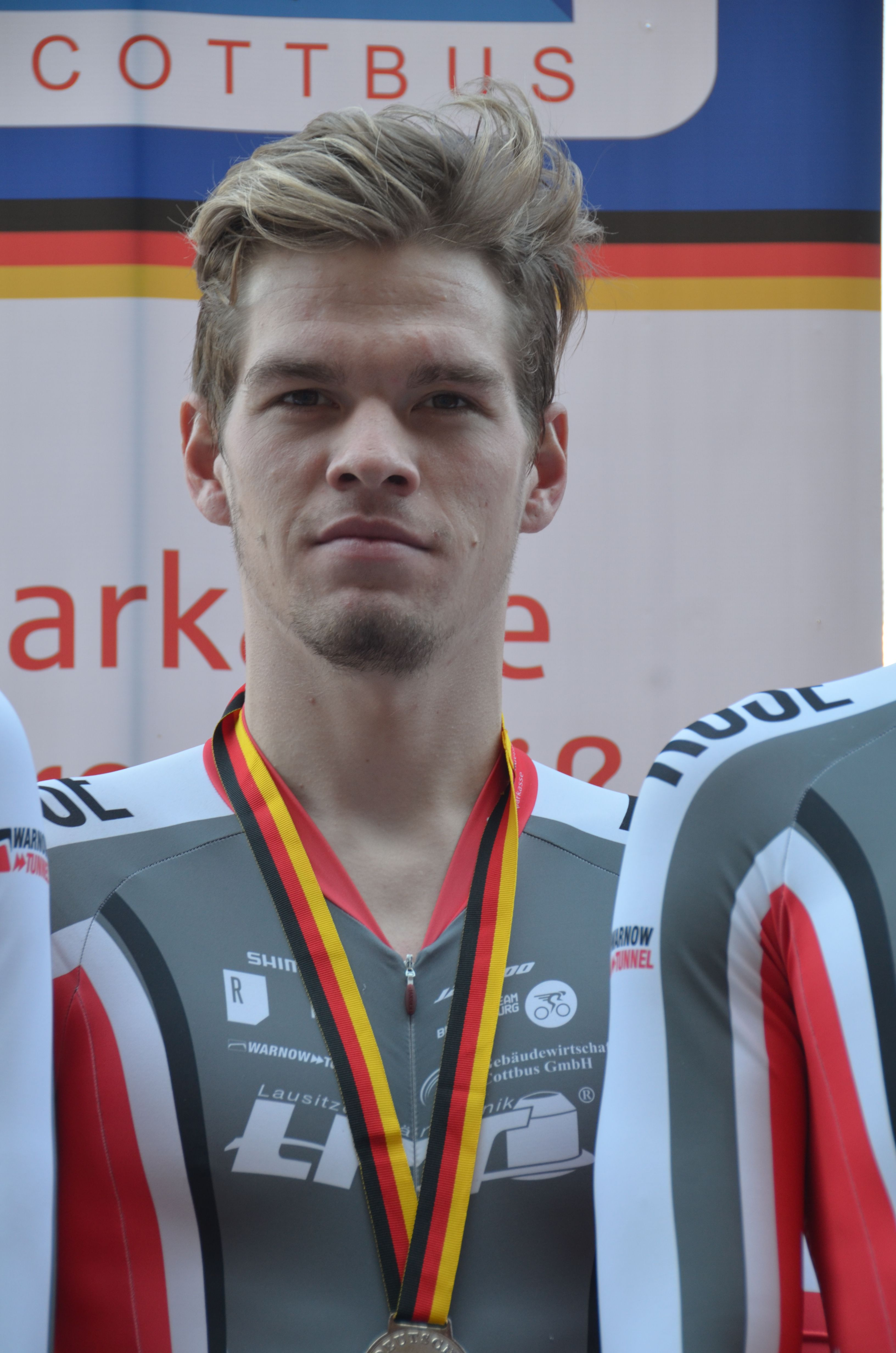 Franz Schiewer, deutscher Radsportler